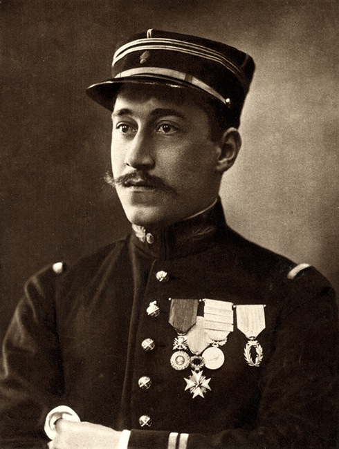 Ernest Psichari (27 septembre 1883 - 22 août 1914) est un officier et écrivain français.